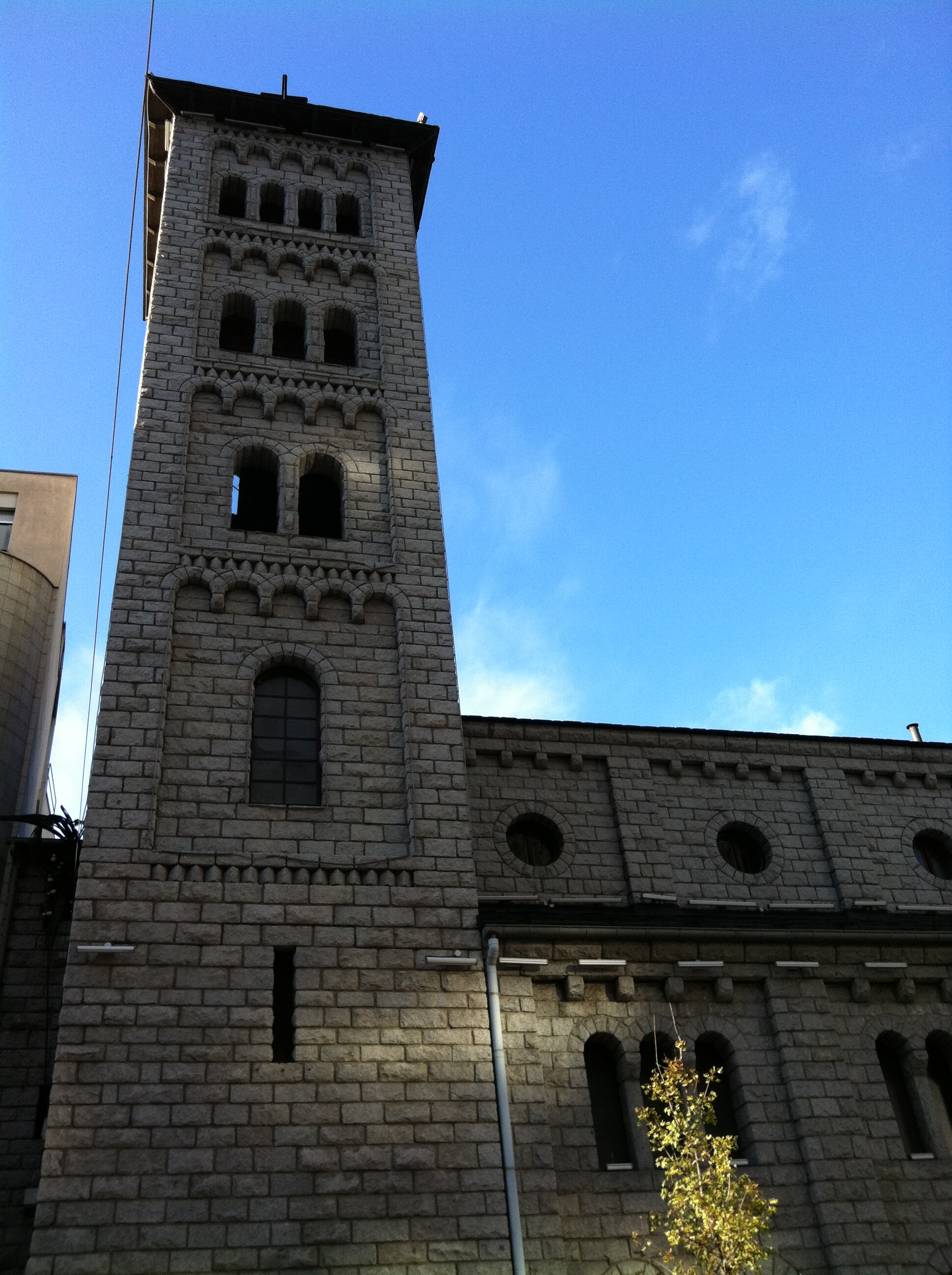 Sant Pere Màrtir, Escaldes-Engordany